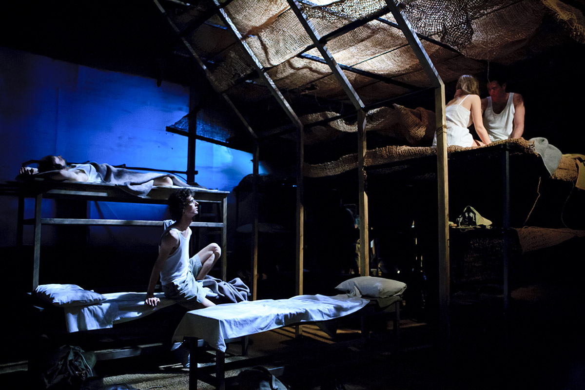 מיכאל גמליאל, קארין סרויה וחן נוכר ב"בין לילה ובין שחר" בבימויו של סלבה מלצב